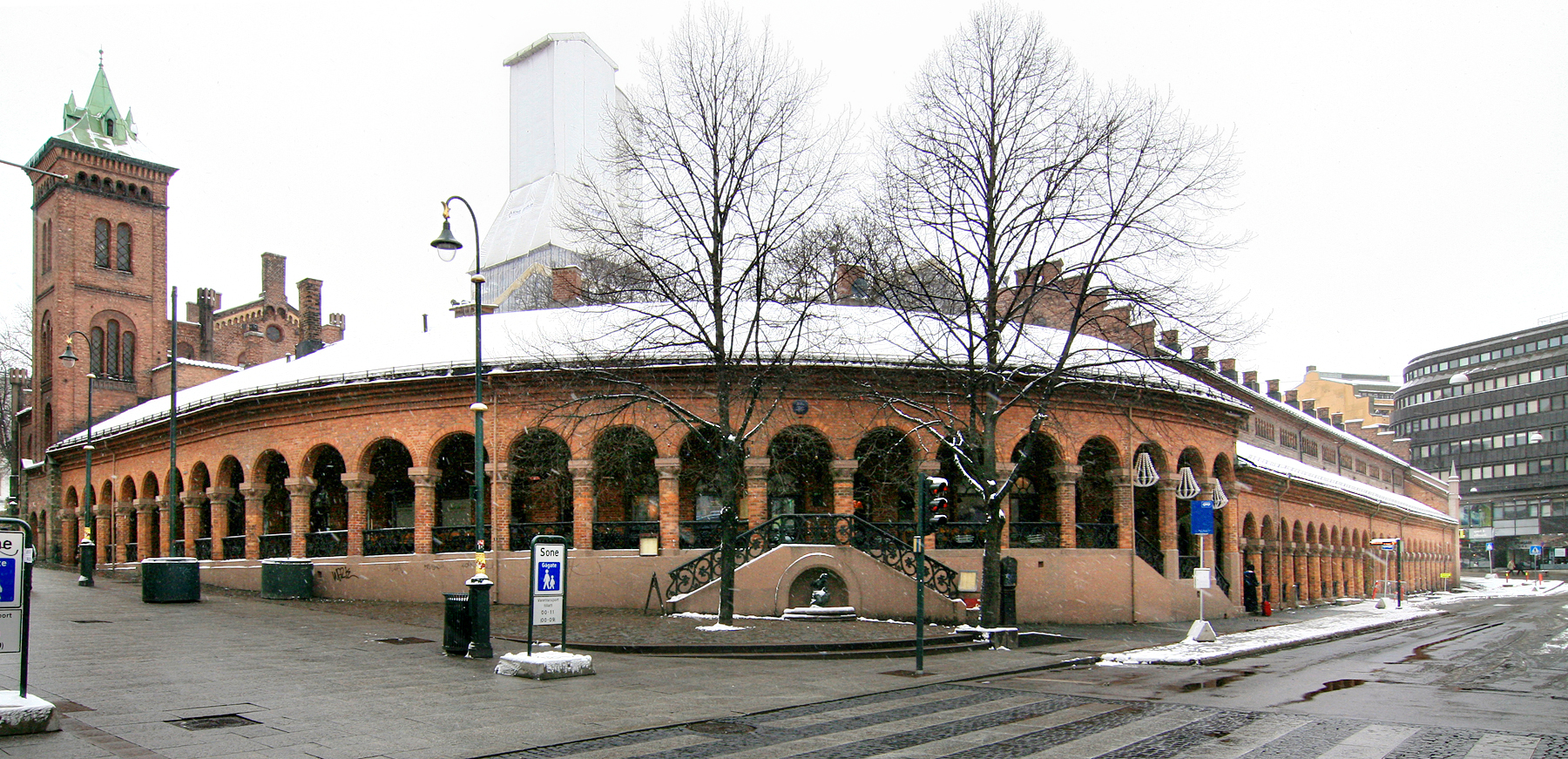 Basarene, Dronningens gate 27, Oslo. Salgsboder oppført for Christiania kommune 1841-42 og 1846-58 etter tegninger av arkitekt Christian Grosch. Nyromansk stil. Freda 1927.